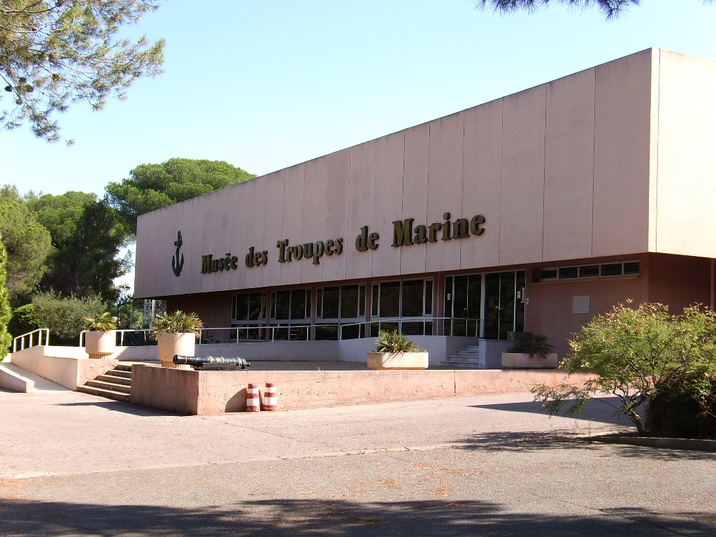 Musée des troupes de Marines, Fréjus (83)